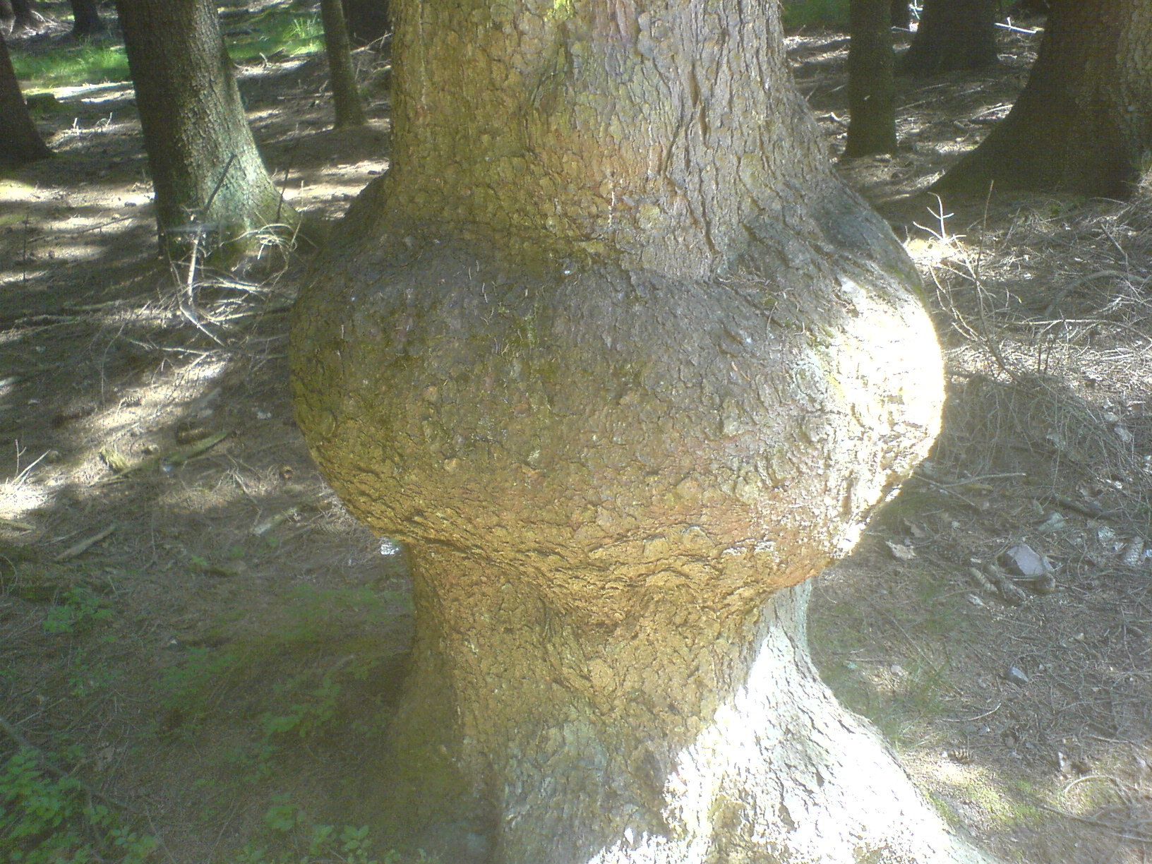 Maserknolle an einem Baum; Standort: Waldweg zwischen Gronig (Kapellenwiese) und der Nohmühle; Die geographischen Koordinaten sind unsicher bestimmt, der Baum befindet sich aber direkt rechterhand des Weges